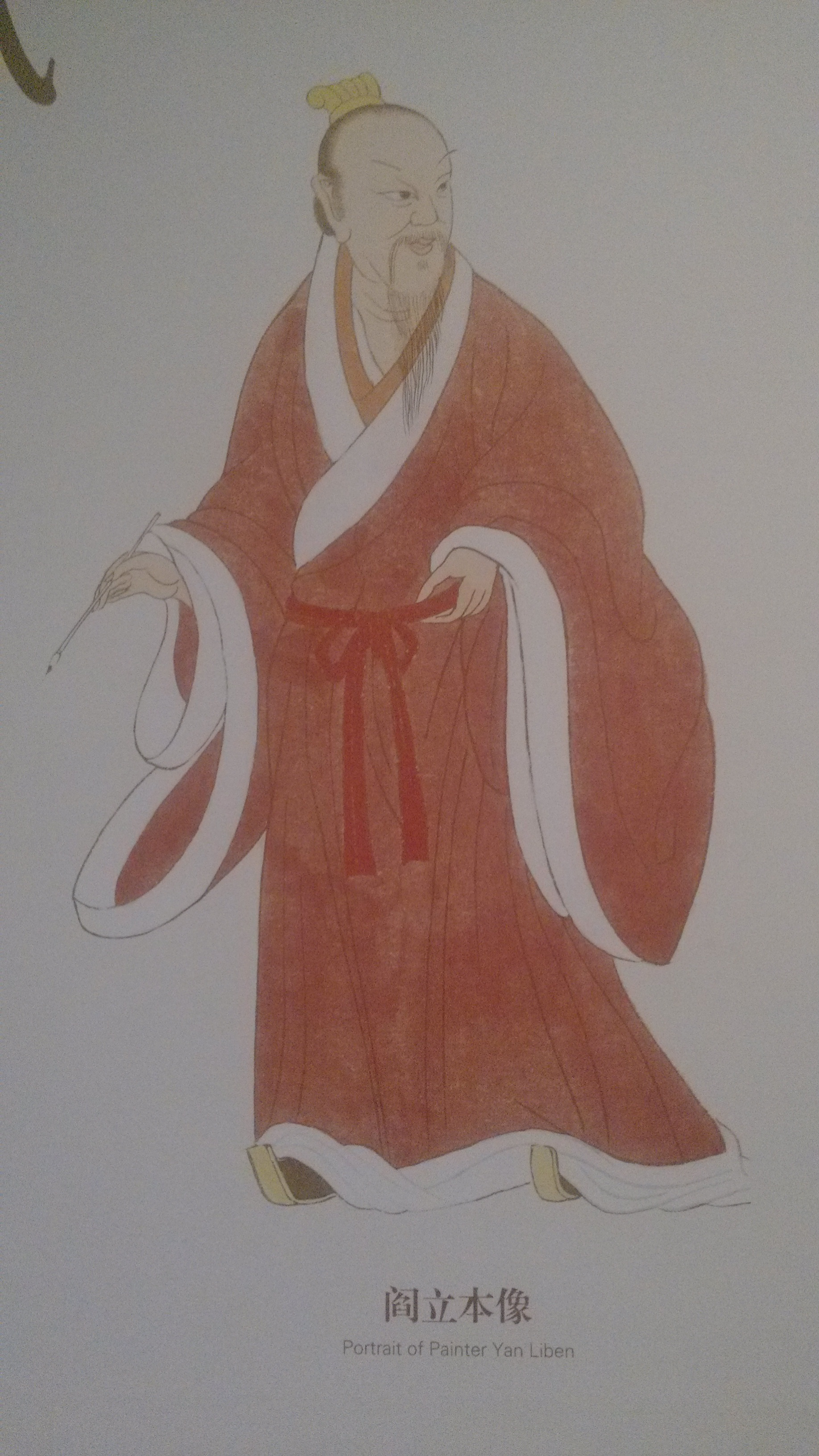 阎立本像，摄于西安大明宫遗址博物馆。